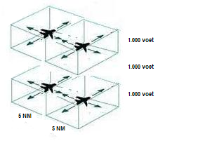 Separatie minima